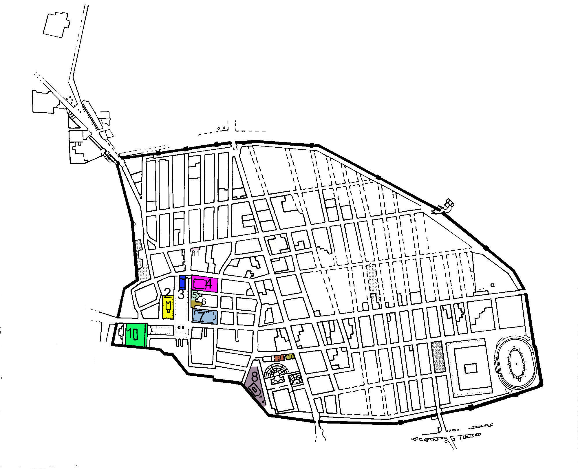 Plan von Pompeji mit eingezeichneten religiösen Bauten